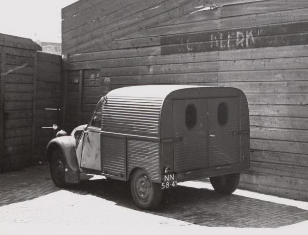 NN-58-41 Citroen AU Fourgonette 1953